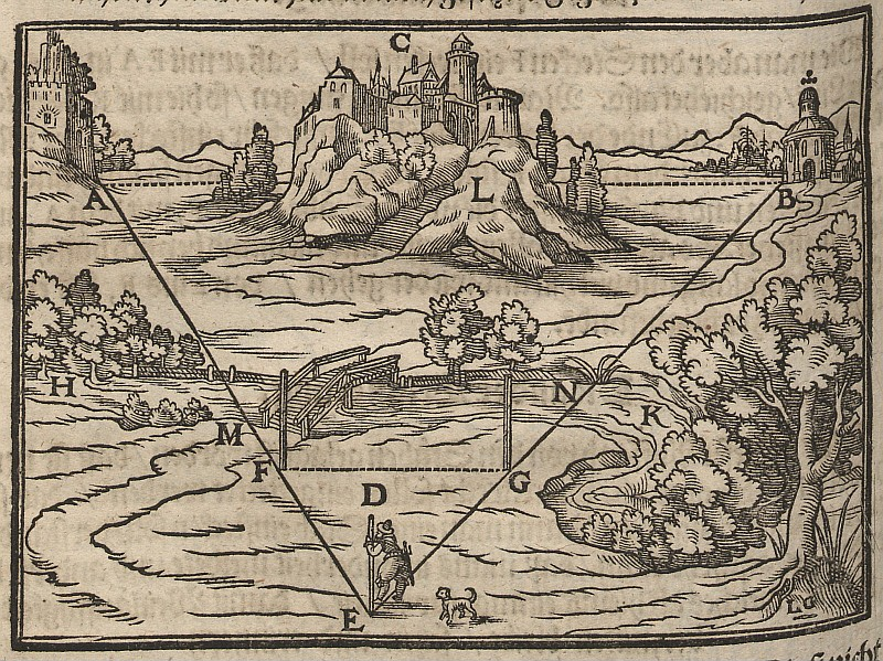 Original image description from the Deutsche Fotothek Geometrie & Vermessung & Instrument